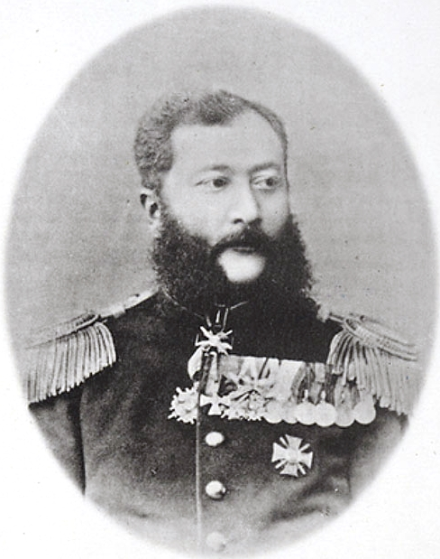 Араблинский, Балакиши Али-бек: Чин/звание: «Генерал-лейтенант». Знаки различия на картине: эполеты «Полковник».